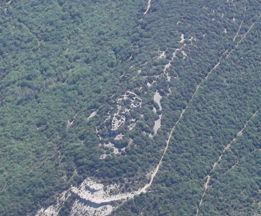 Vue aérienne du château Saint-Jean. Pompignan, Gard, France. Prise le 21/06/2011.